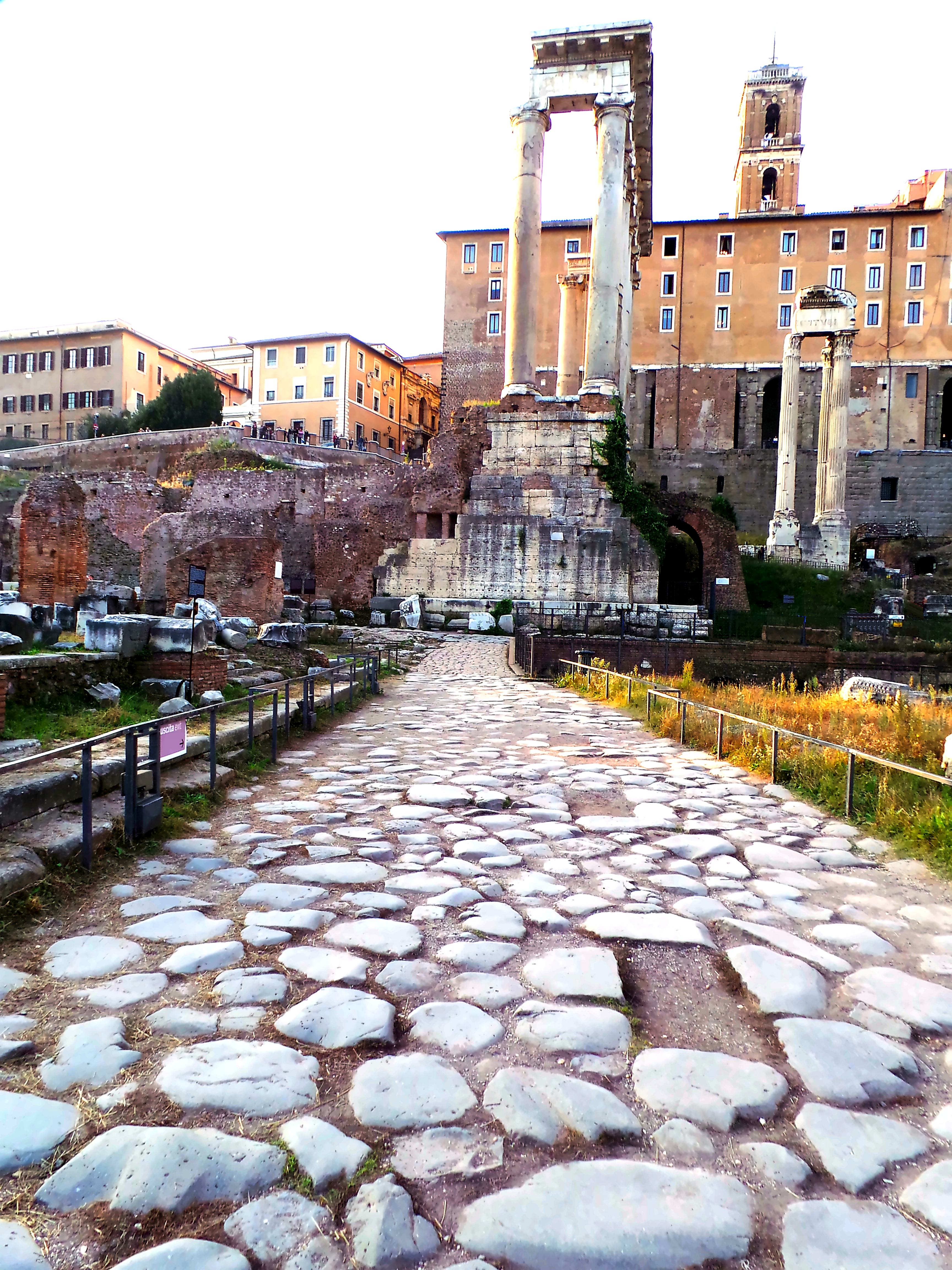 Die Via Sacra auf dem Forum Romanum, die zum [Tempel des Saturn führt